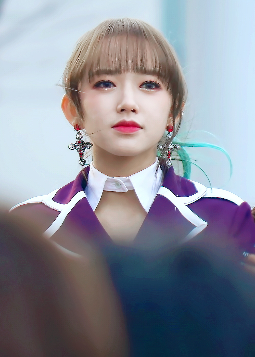 180317 우주소녀 미니팬미팅 직찍